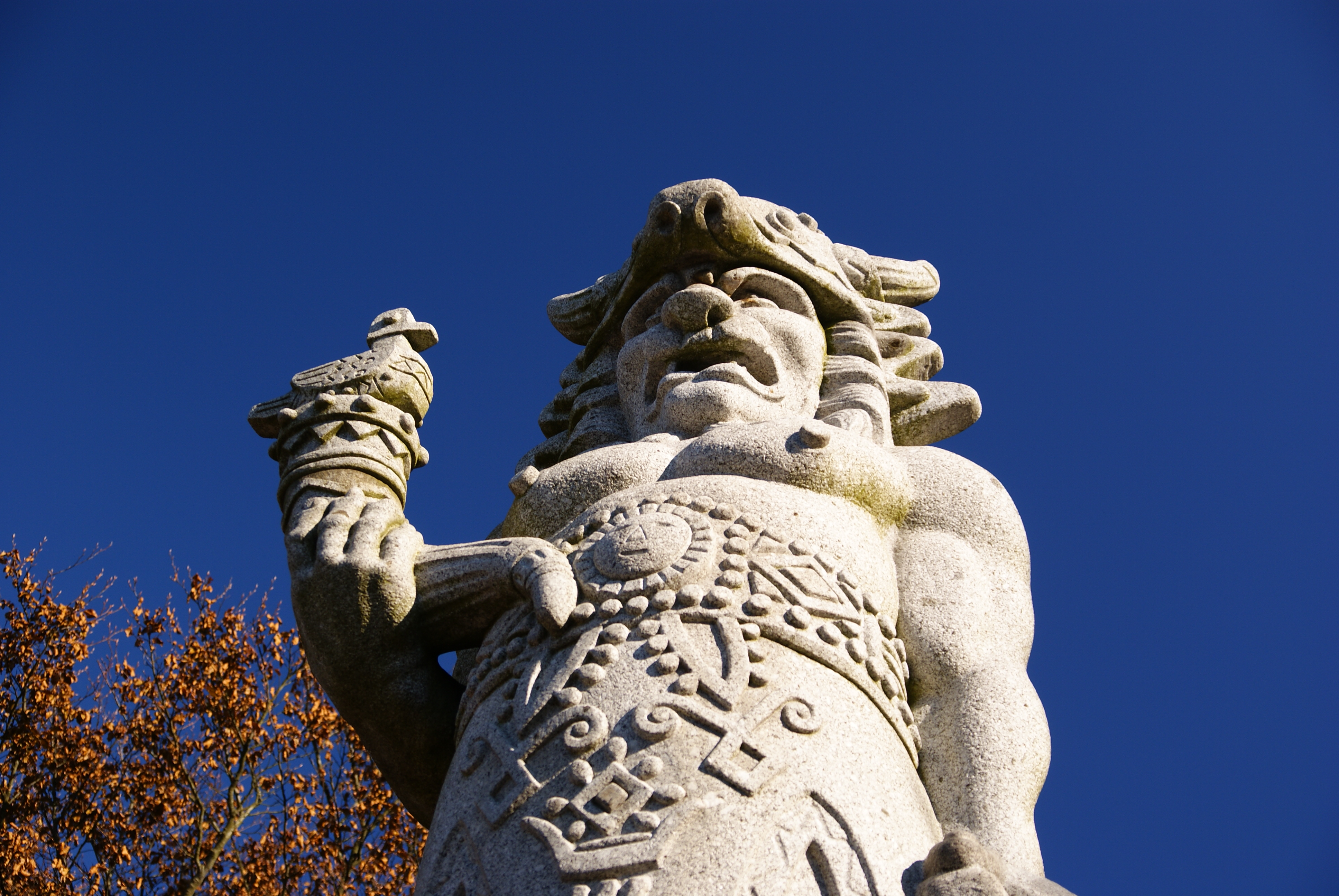 Socha Radegasta (Dolní Bečva), cesta z Pusteven na Radhošť, Dolní Bečva